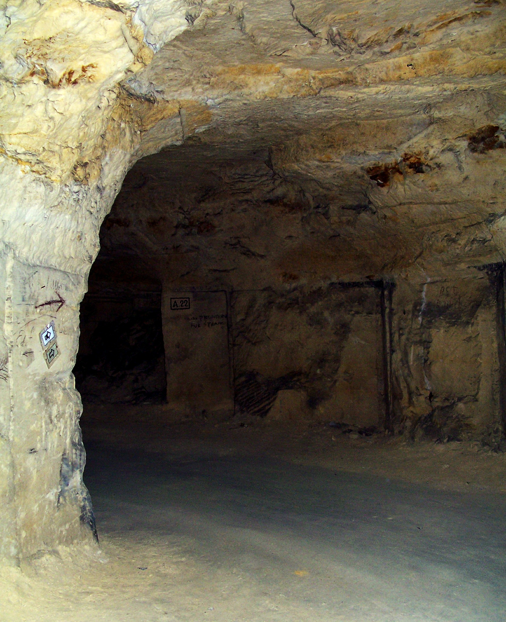 Sibberberg mergelgroeve Limburg, Netherlands